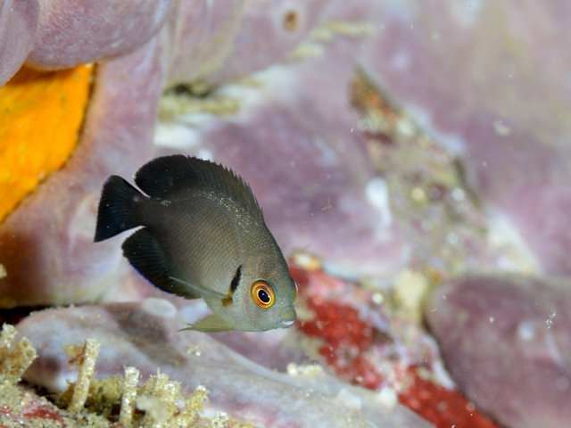 ナメラヤッコ Centropyge vrolikii